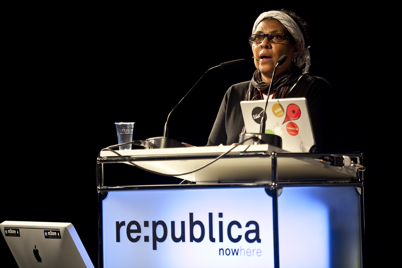 Sokari Ekine beim Panel zu Mobile Activism in Afrika auf der re:publica. Photo by Daniel Seiffert